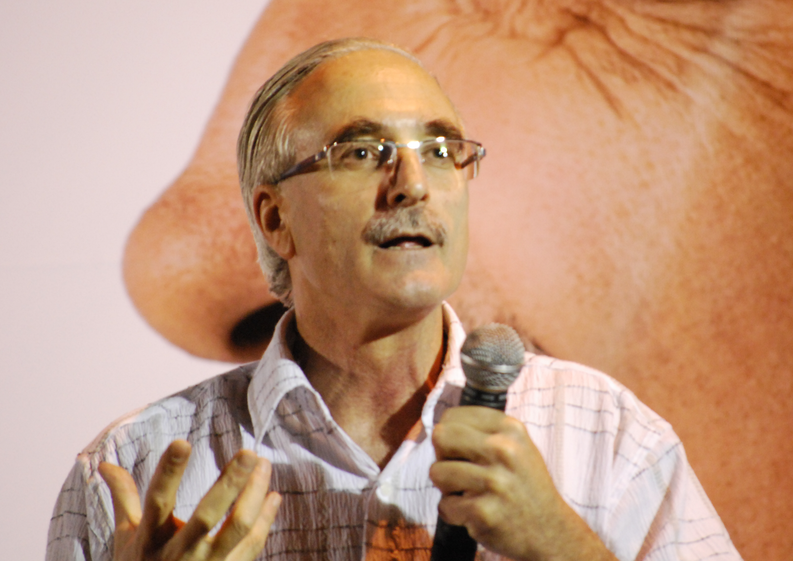 Fotografía del político uruguayo Eduardo Lorier.